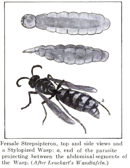 Female strepsipteran